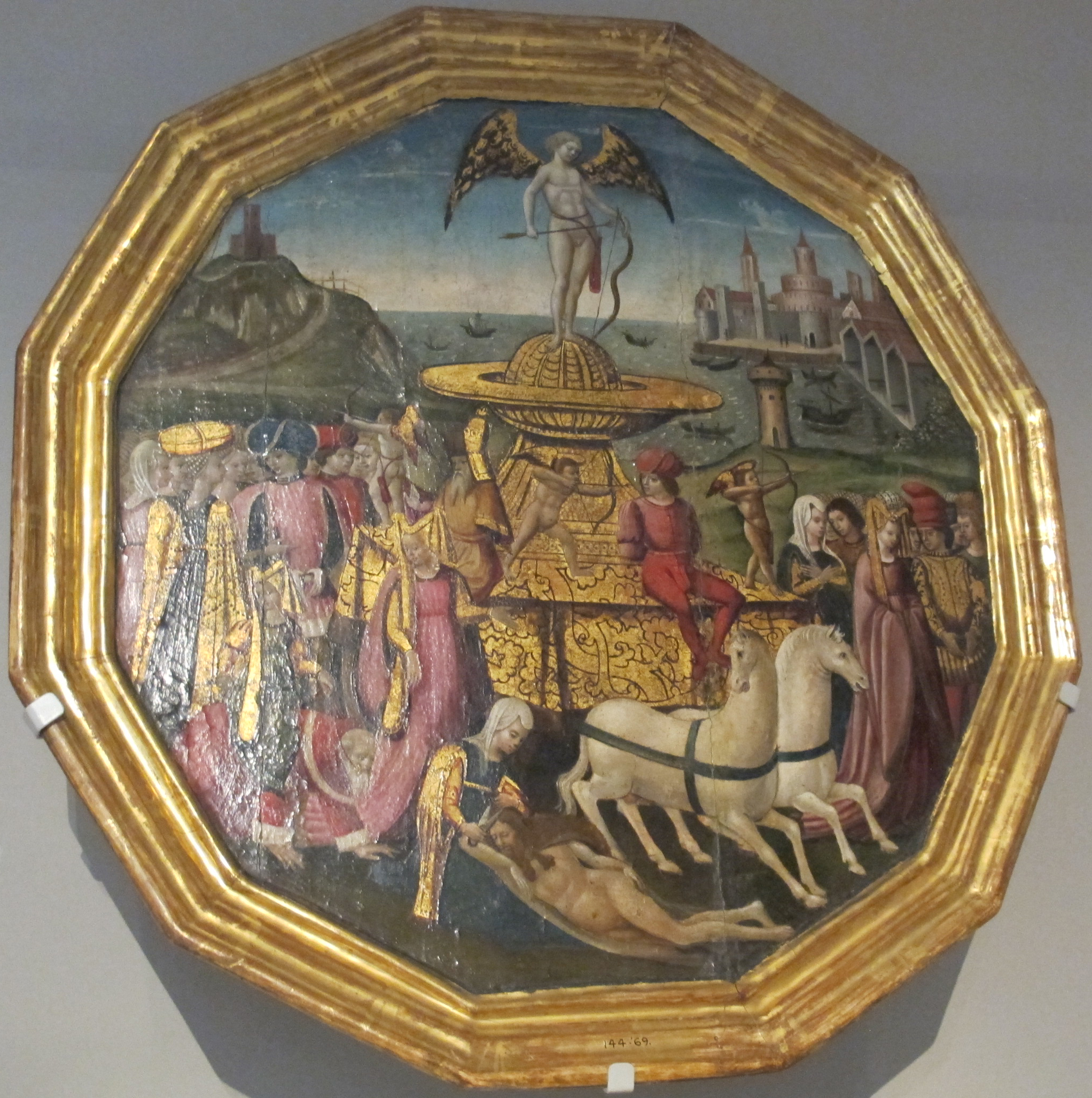 Apollonio di giovanni (cerchia), desco da parto con il trionfo dell'amore, 1460-70 ca.